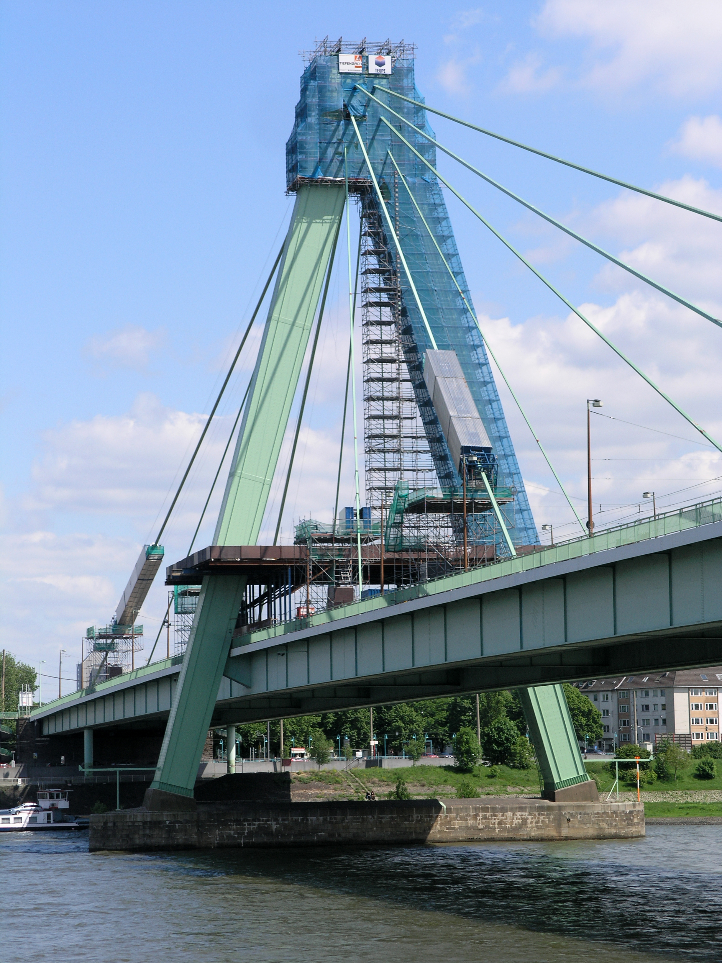 Северный Рейн - Вестфалия, Кёльн - Мост Святого Северина